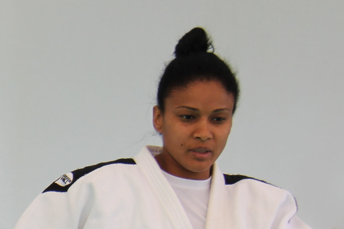 Anaysi Hernandez durante uno stage di Judo